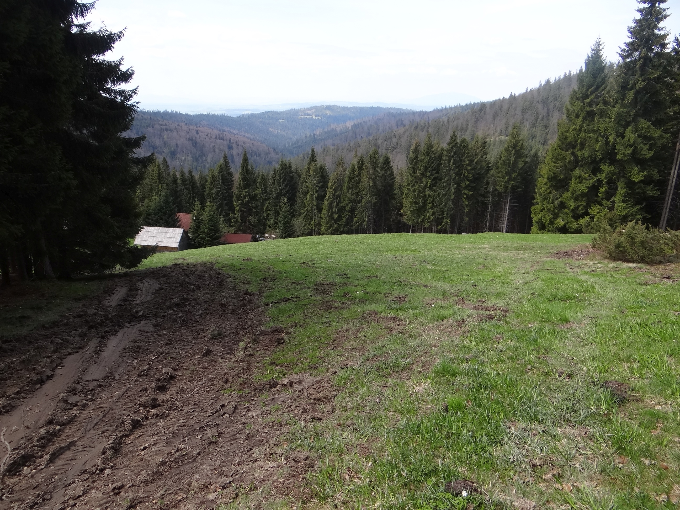 Polana Jaworzynka w Obidowej